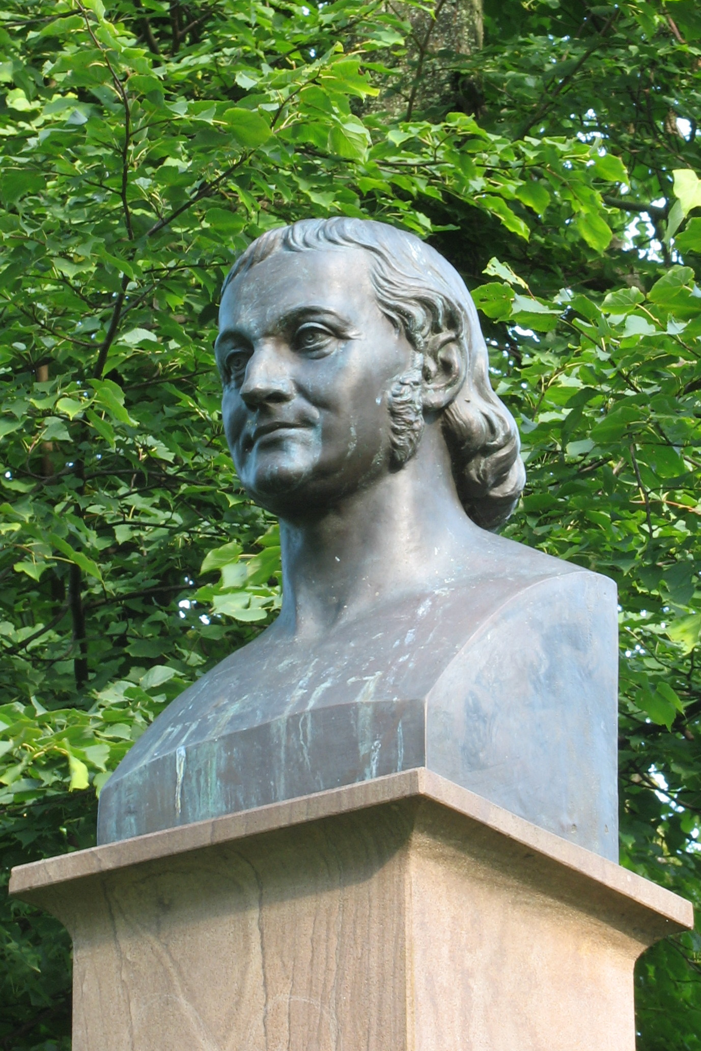 Bust of Isaak Altmann. The sign below says: "Isaak Hermann Albert Altmann // 1777–1837 // Schöpfer der Bremer WALLanlagen // Anläßlich des 200. Geburtstags der WALLanlagen im Jahr 2002 hat Stadtgrün Bremen dieses Denkmal aufstellen lassen."